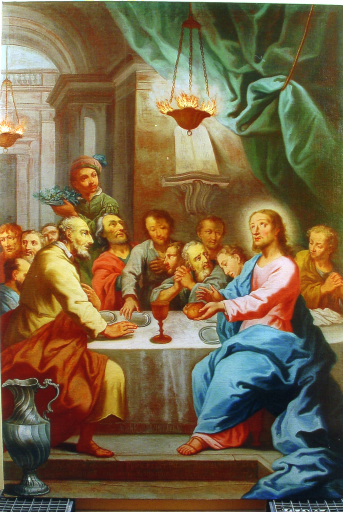 Letztes Abendmahl mit persönlicher Widmung von Kurfürst Carl Theodor an Pater Theodor Schneider, Pennsylvania